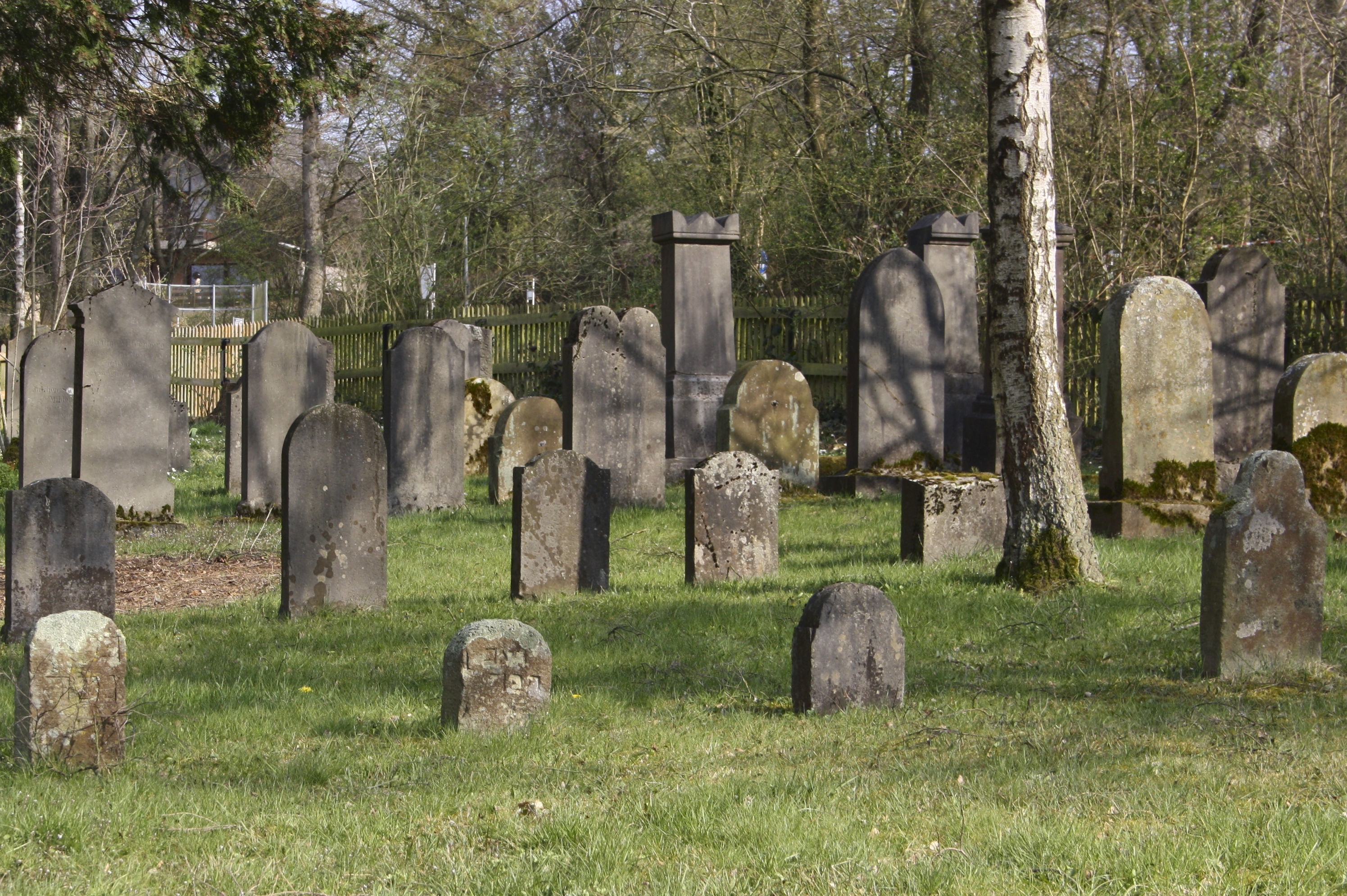 Jüdischer Friedhof Montabaur, Westerwaldkreis, Rheinland-Pfalz, Deutschland